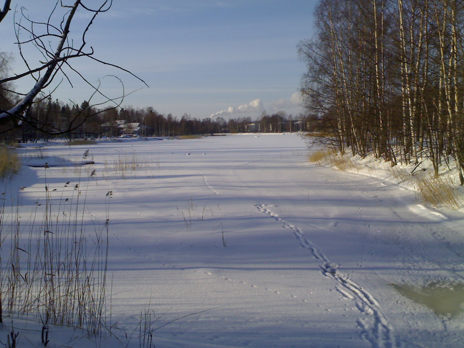 Porolahti